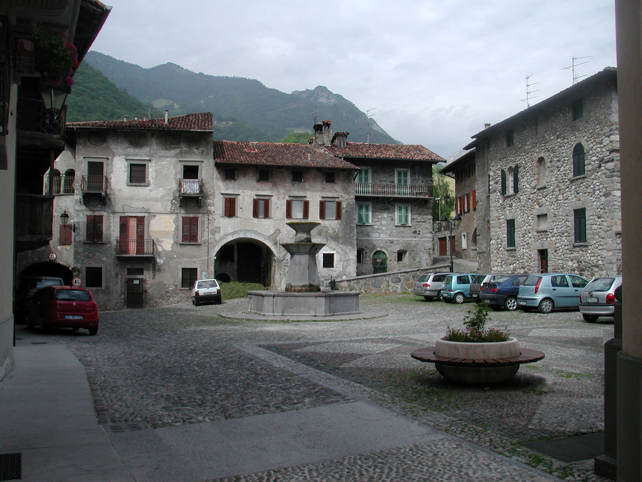 Val Seriana, Italy